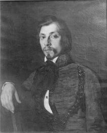 Alois Hunin (1806-1865)